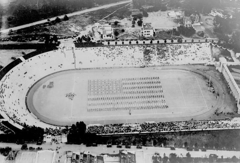 Das Lebende Sternenbanner ! Die Luftaufnahme zeigt das lebende Sternenbanner, gestellt von amerikanischen Marinesoldaten im Balboa Stadion in San Diego. Information added by Wikimedia users.U.S. Marines displaying the stars and stripes at Balboa Stadium, San Diego, California (USA), in 1932.